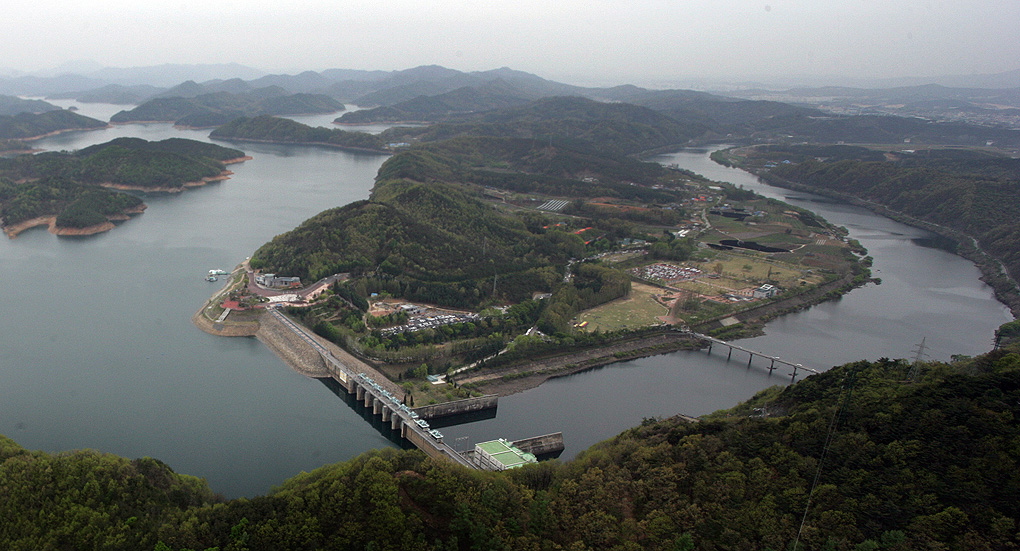 대청댐